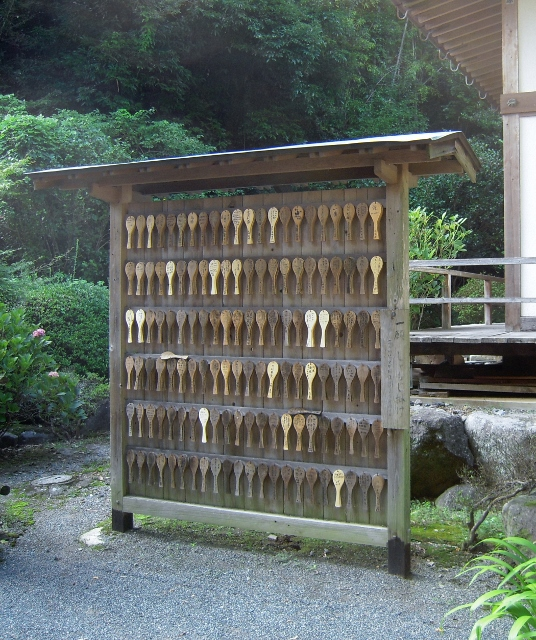 雲巌禅寺（熊本市西区）境内のしゃもじ